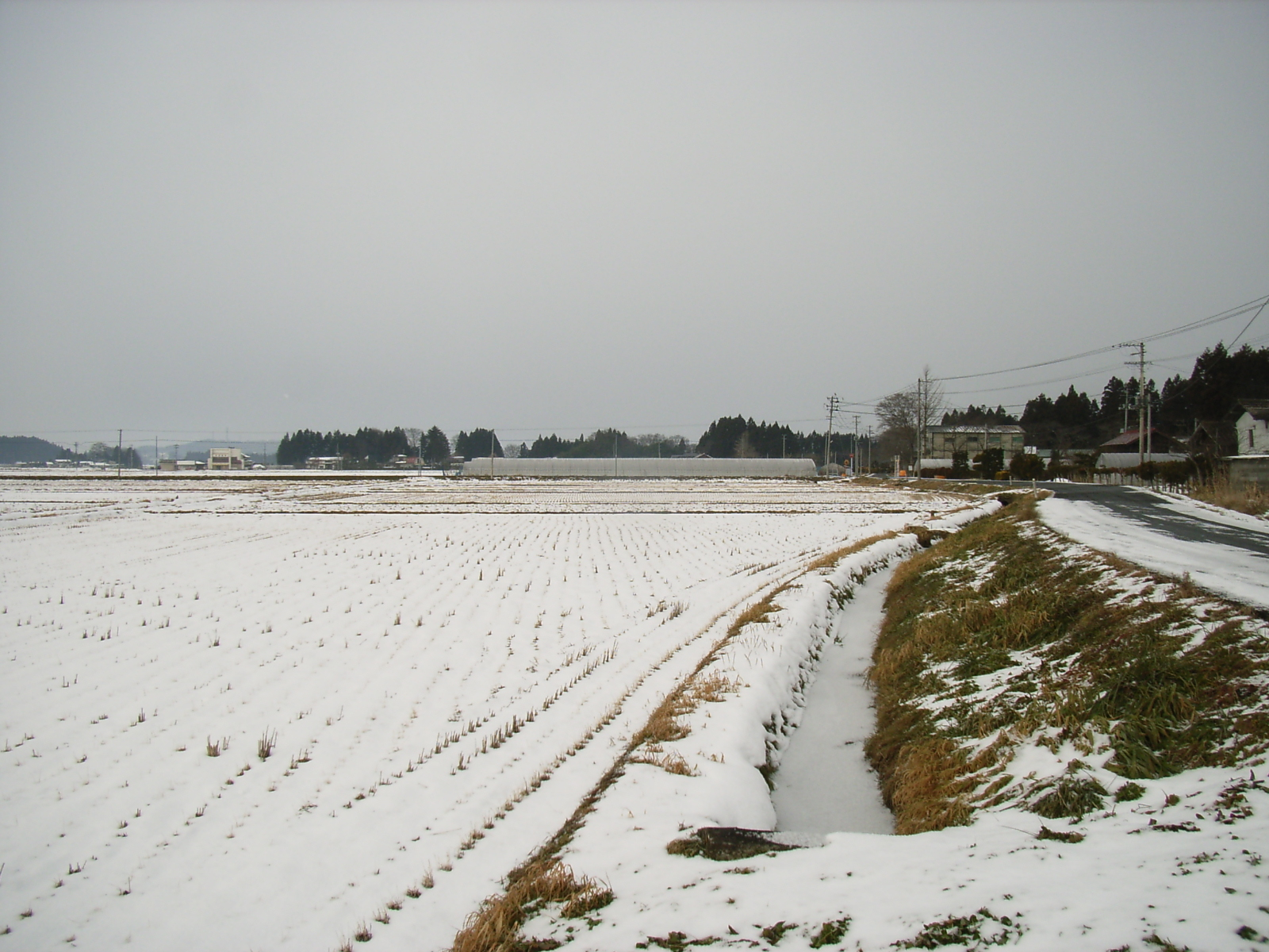 Rice Paddy Field in Kurikoma-Sappirai. Kurihara, Miyagi prefecture, Japan.